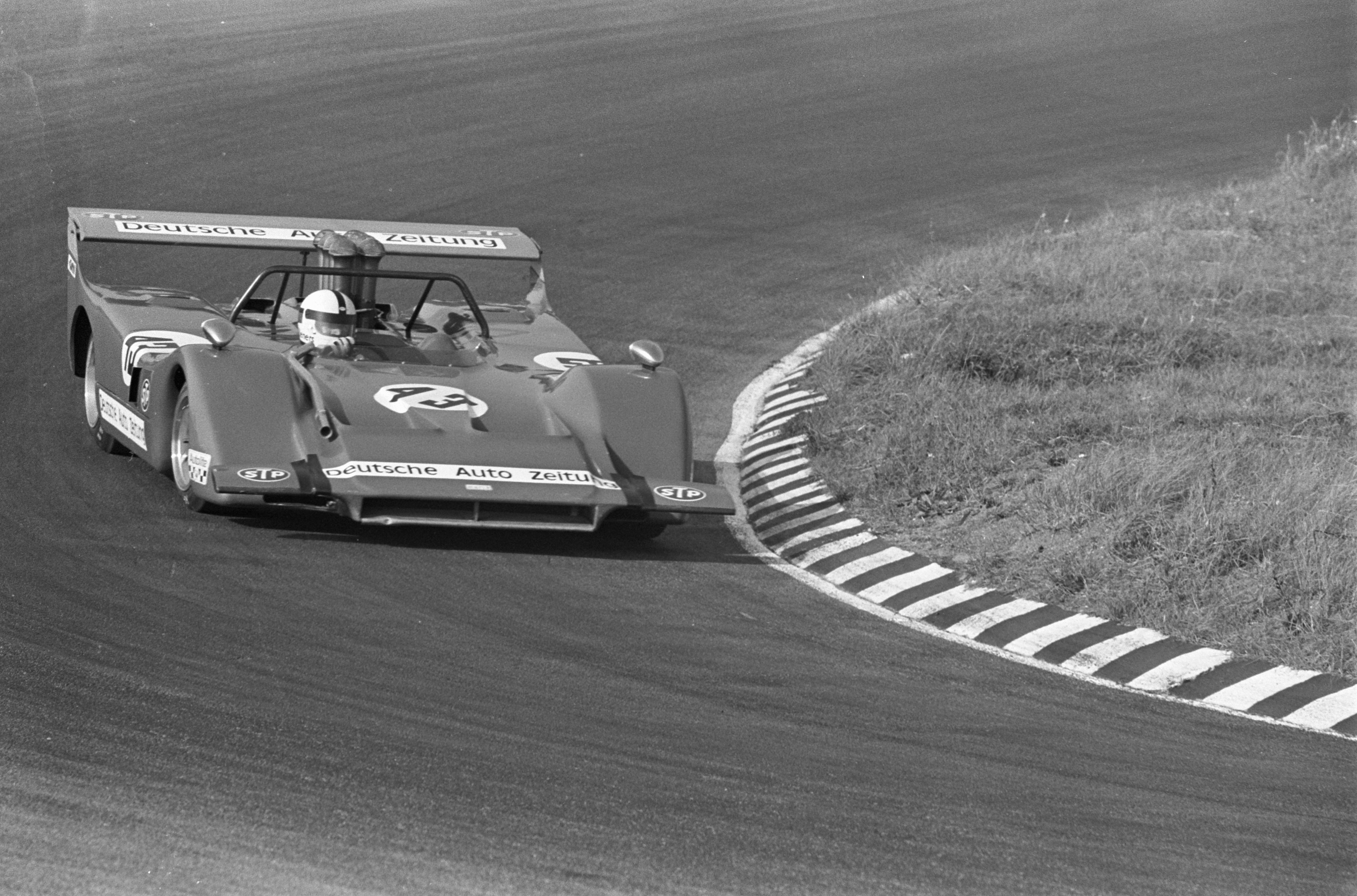 Collectie / Archief : Fotocollectie Anefo Reportage / Serie : [ onbekend ] Beschrijving : Trophy of the Dunes , Zandvoort; races voor sportcars en prototypes Datum : 20 september 1970 Locatie : Noord-Holland, Zandvoort Trefwoorden : RACES Instellingsnaam : Trophy of the Dunes Fotograaf : Evers, Joost / Anefo Auteursrechthebbende : Nationaal Archief Materiaalsoort : Negatief (zwart/wit) Nummer archiefinventaris : bekijk toegang 2.24.01.05 Bestanddeelnummer : 923-8581